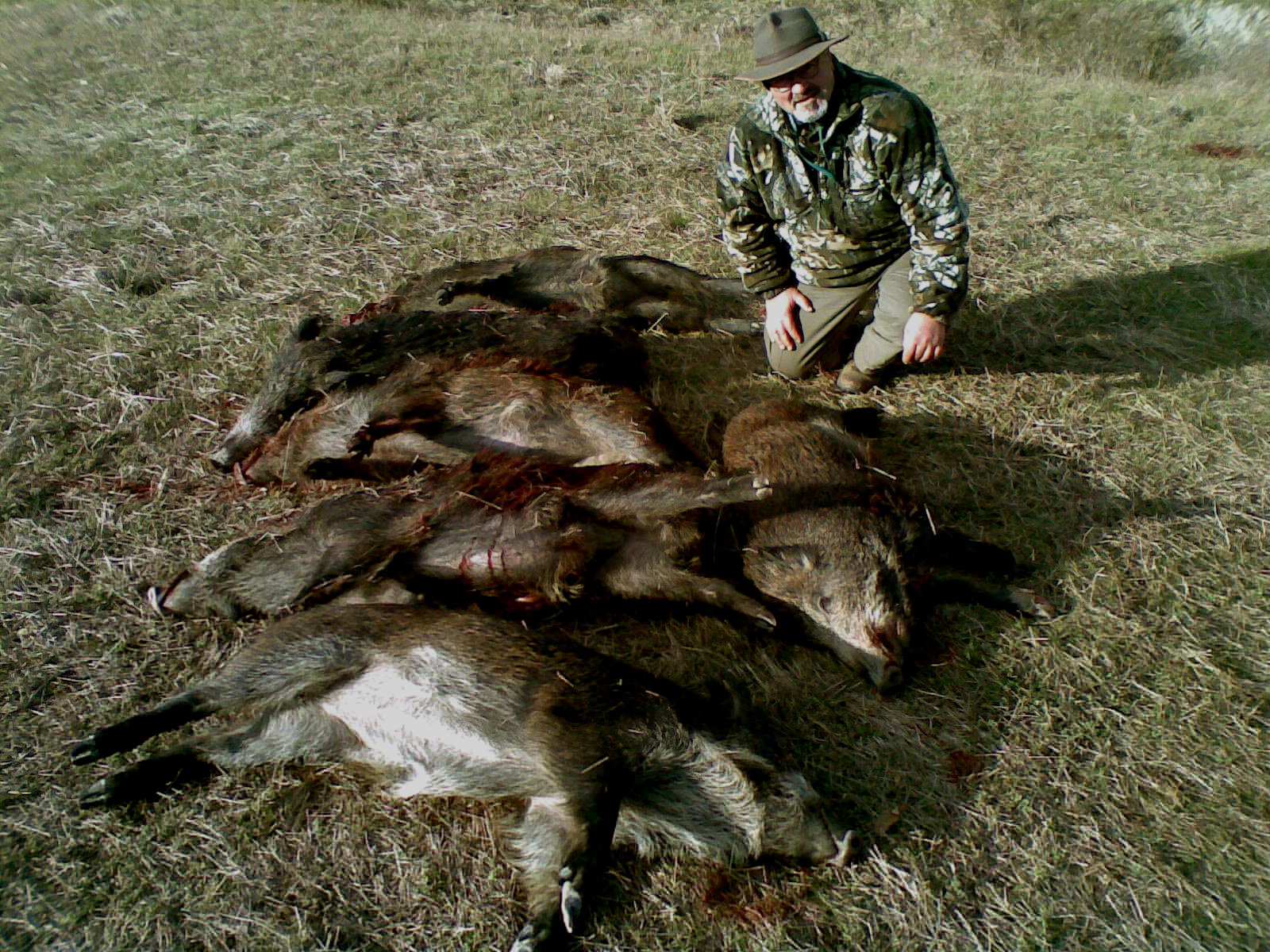 Abbattimento programmato della fauna locale